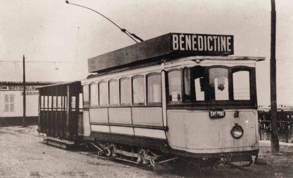 Motrice (avec plate-formes fermées) et remorque du tramway d'Eu-Le Tréport